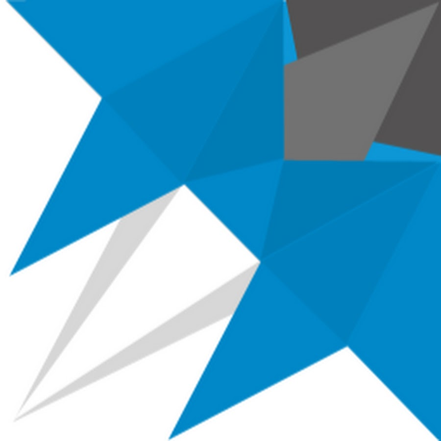 gambar logo distro xentaOS